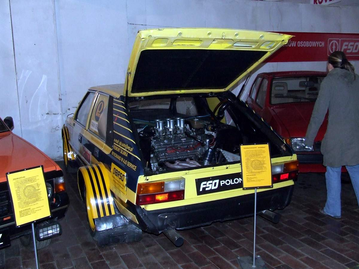 Stratopolonez, Muzeum Przemysłu w Warszawie.